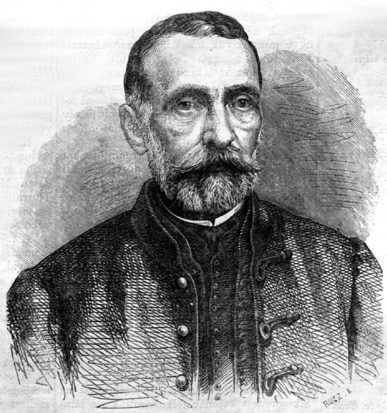 Rottenbiller Lipót (1806–1870) politikus, Pest főpolgármestere. Rusz Károly metszete (Vasárnapi Ujság, 1865. október 22.)